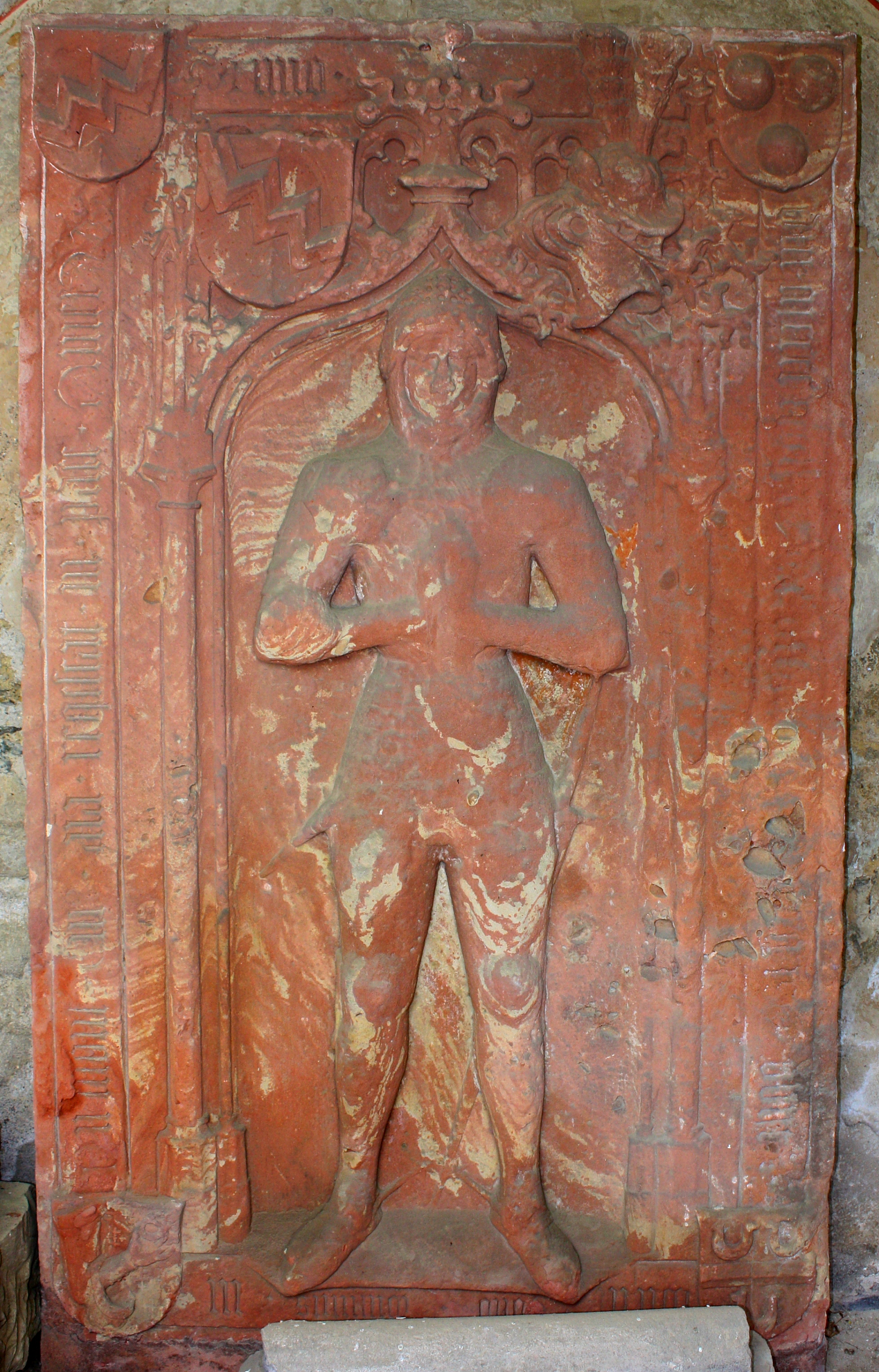 Grabplatte des Ritters Cuno VI. von Pyrmont in St. Castor in Treis Karden an der Mosel